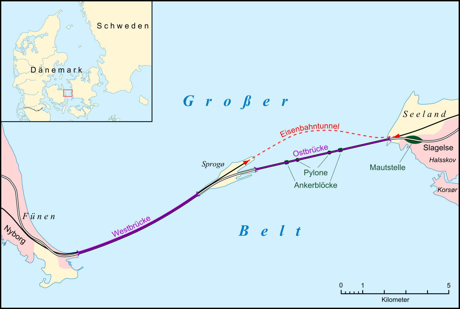 Karte der Storebælt-Brücke über den Großen Belt